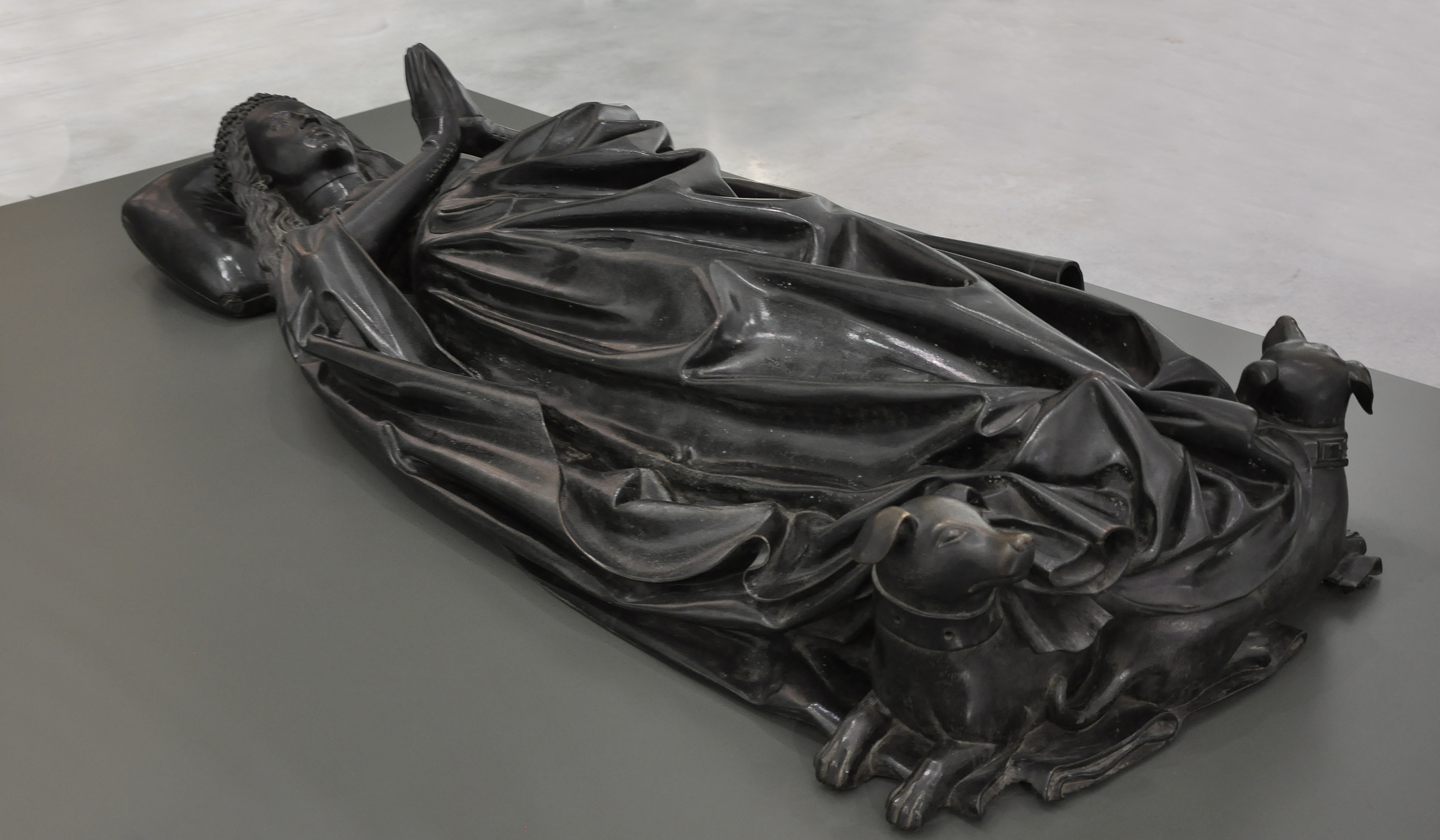 Het grafmonument van Isabella van Bourbon (1436-1465), toegeschreven aan Jan II Borman and Reinier van Thienen in het M - Museum Leuven, oorspronkelijk in de Sint-Michielsabdij te Antwerpen. Het monument werd in 1566 beschadigd door beeldenstormers. Haar gelaat is geïnspireerd door een schilderij van Rogier van der Weyden.